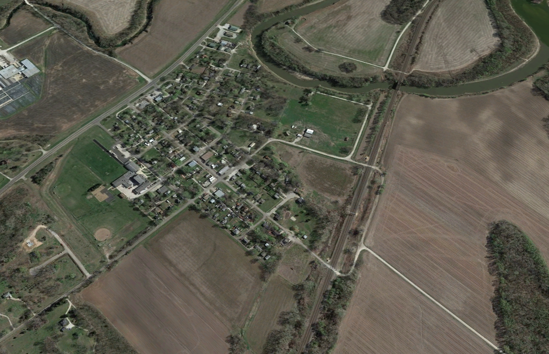 Depicted place: Linwood